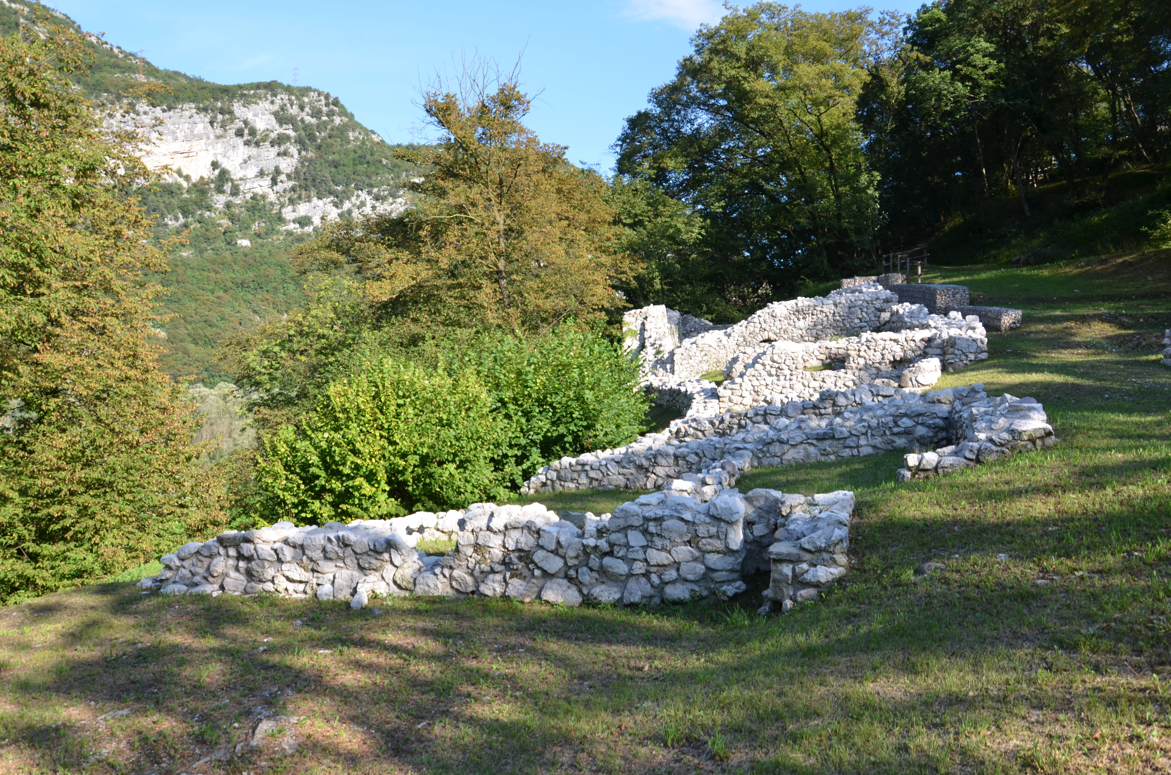 Isola di Sant'Andrea This is a photo of a monument which is part of cultural heritage of Italy.